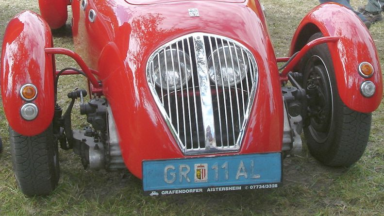 Vorder-Radaufhängung mit Kurbellenkern an einem Healey Silverstone